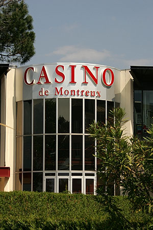 Casino de Montreux